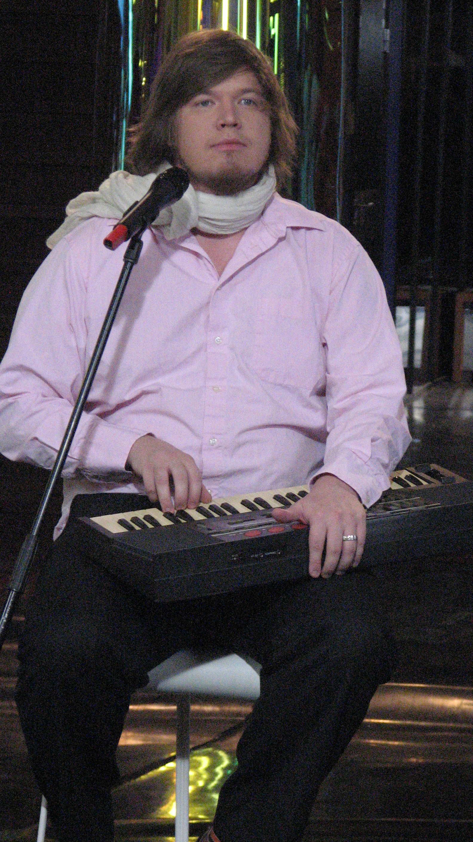 Chalice alias Jarek Kasar esinemas Ringvaate Eesti Laulu salvestusel